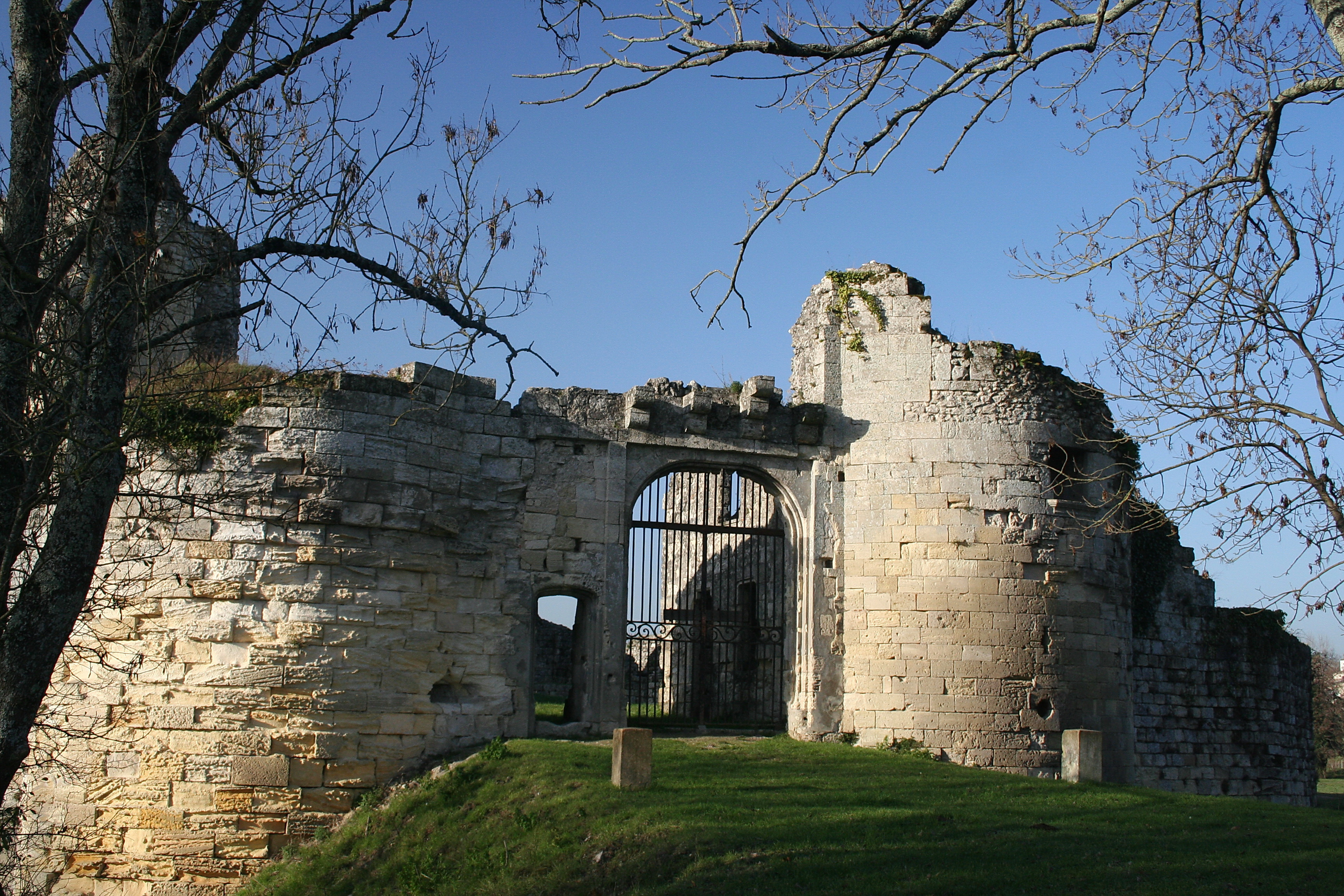 Château de Blanquefort ou Château du Prince noir - Entrée